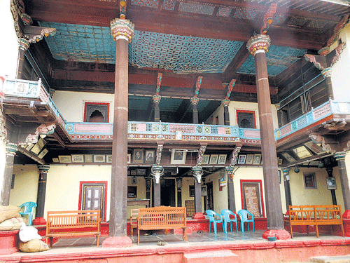 ಕನ್ನಡ: ಕೋಟೆಯ ಒಳಾಂಗಣ